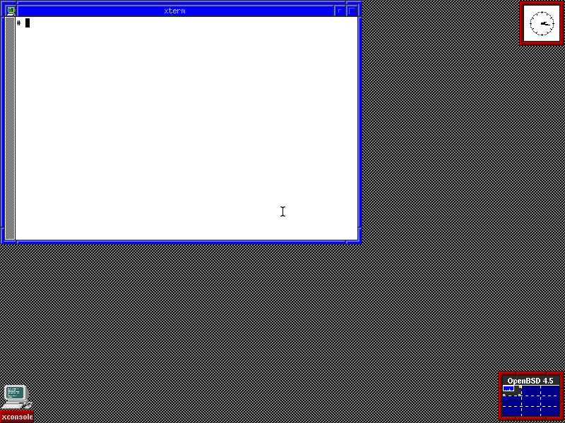 Premier écrans après installation